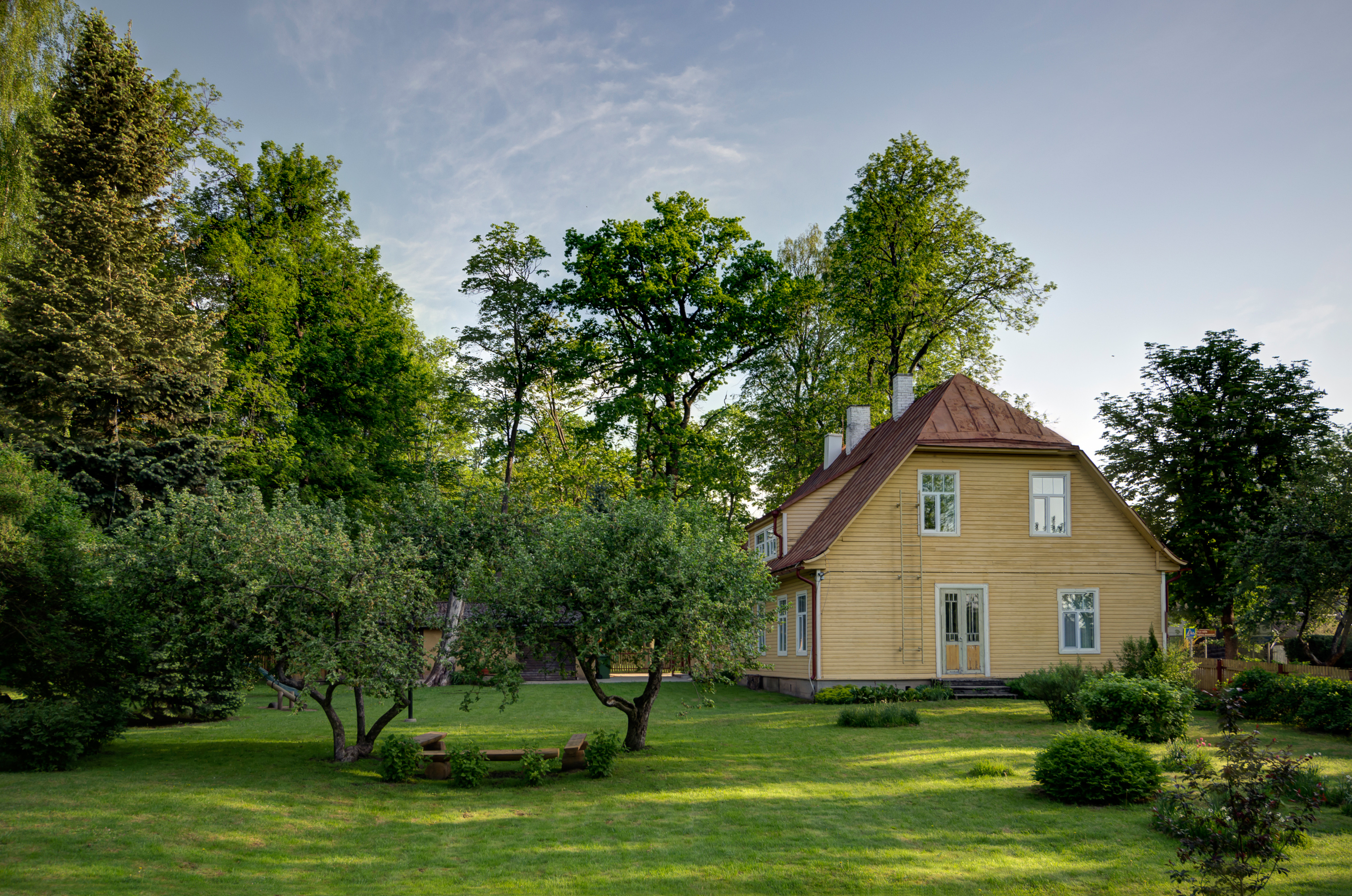 F. Tuglase muuseum ja Ahja raamatukogu. Vaade koos aiaga